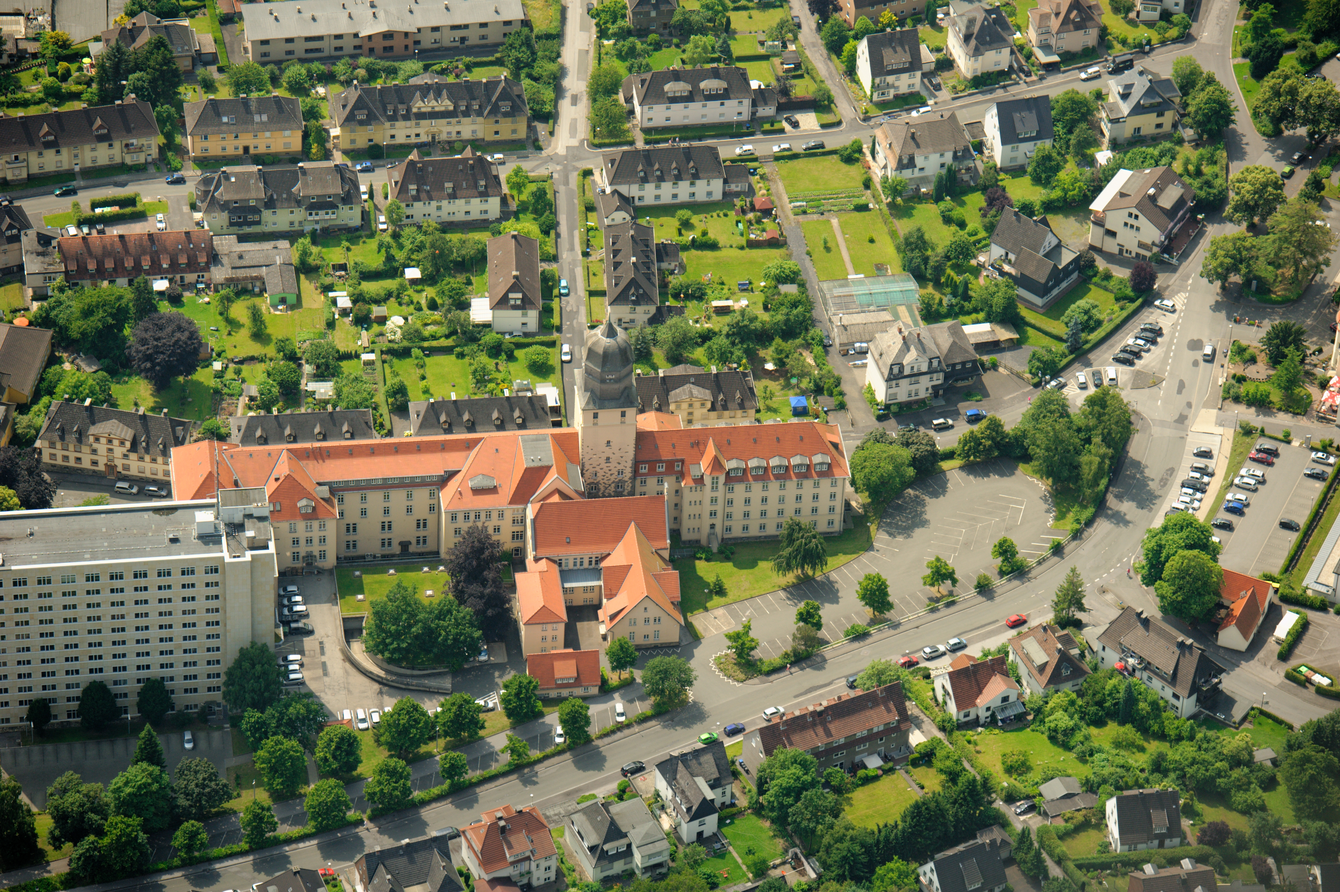 Fotoflug Sauerland-Ost - Arnsberg, Neustadt mit Bezirksregierung (Rückseite) The making of this document was supported by the Community-Budget of Wikimedia Germany.